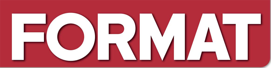 Logo der Zeitschrift Format